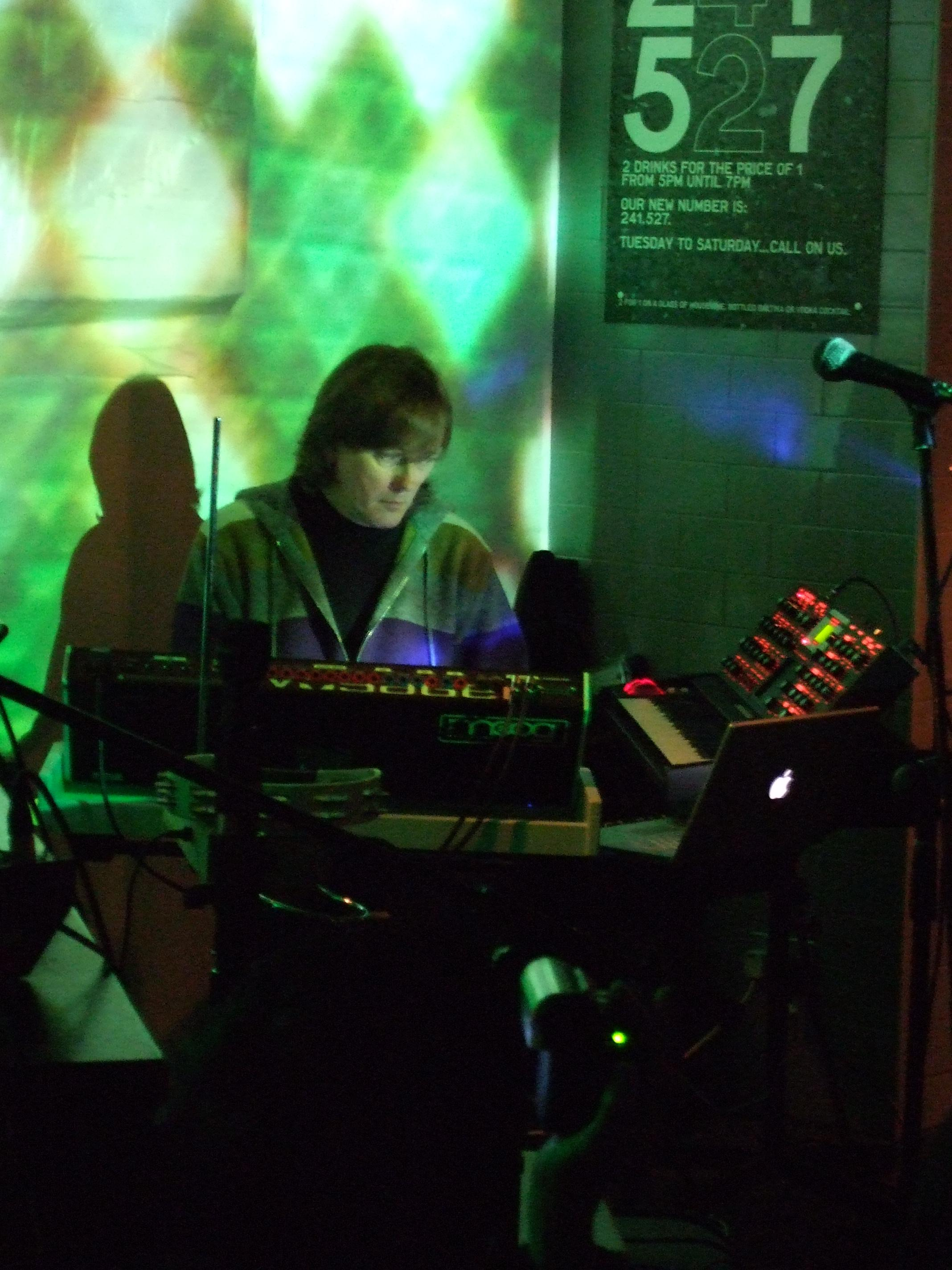 Emiliàn e rumagnòl: Al tasterìsta di Cure Roger O'Donnell